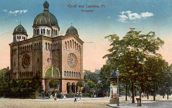 Ansichtskarte mit der Synagoge in Landau in der Pfalz